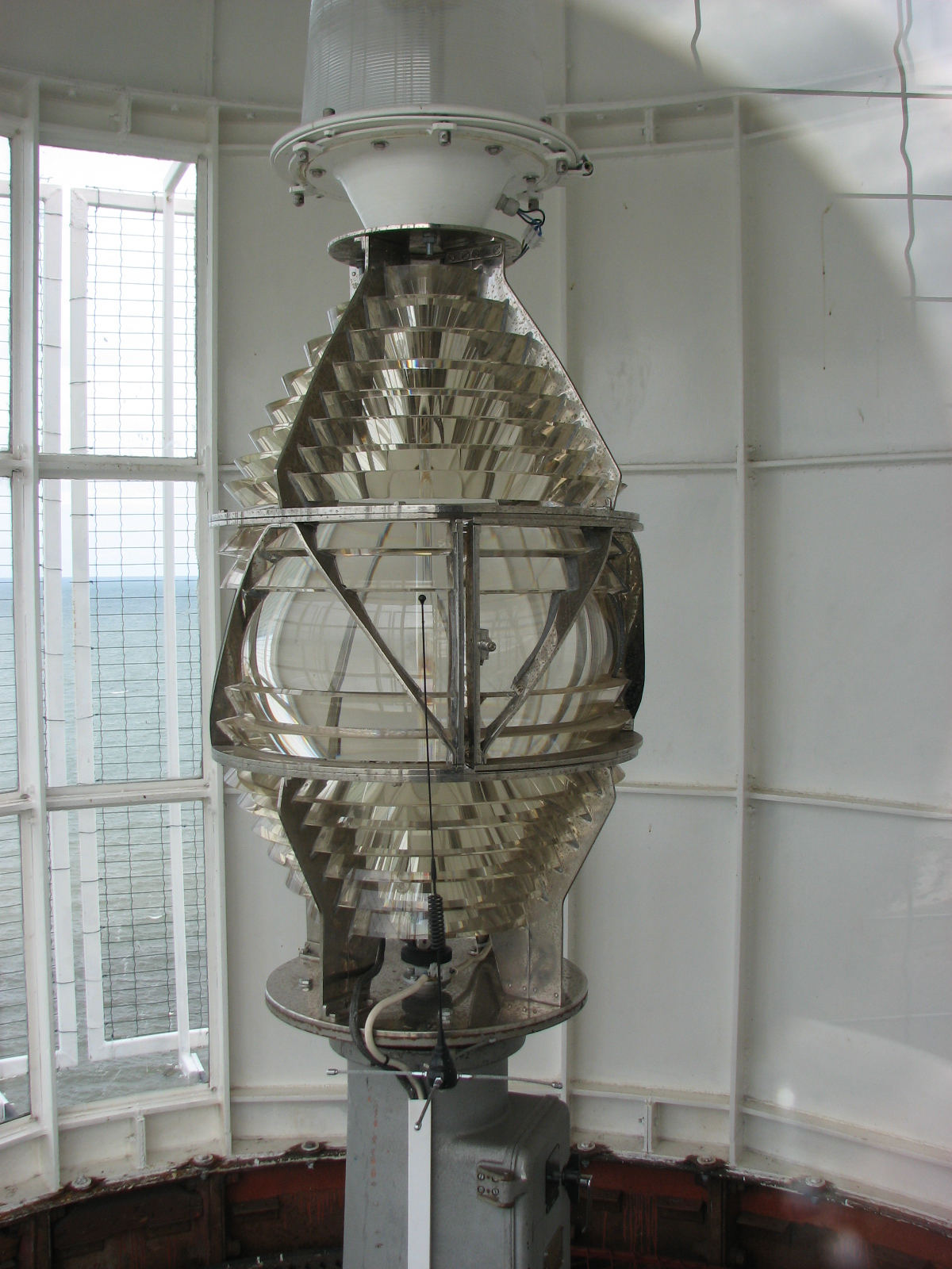 Tahkuna lighthouse, Hiiumaa, Estonia